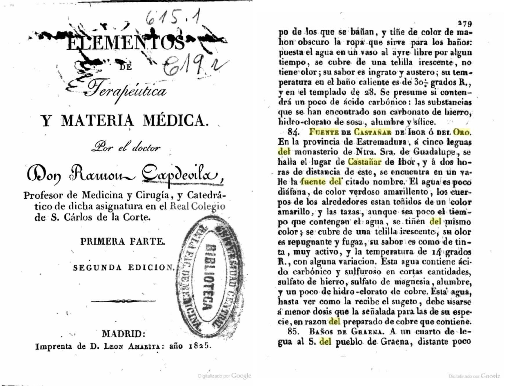 Descripción aguas Fuente del Oro - Fuente de Castañar de Ibor - Fuente Santa